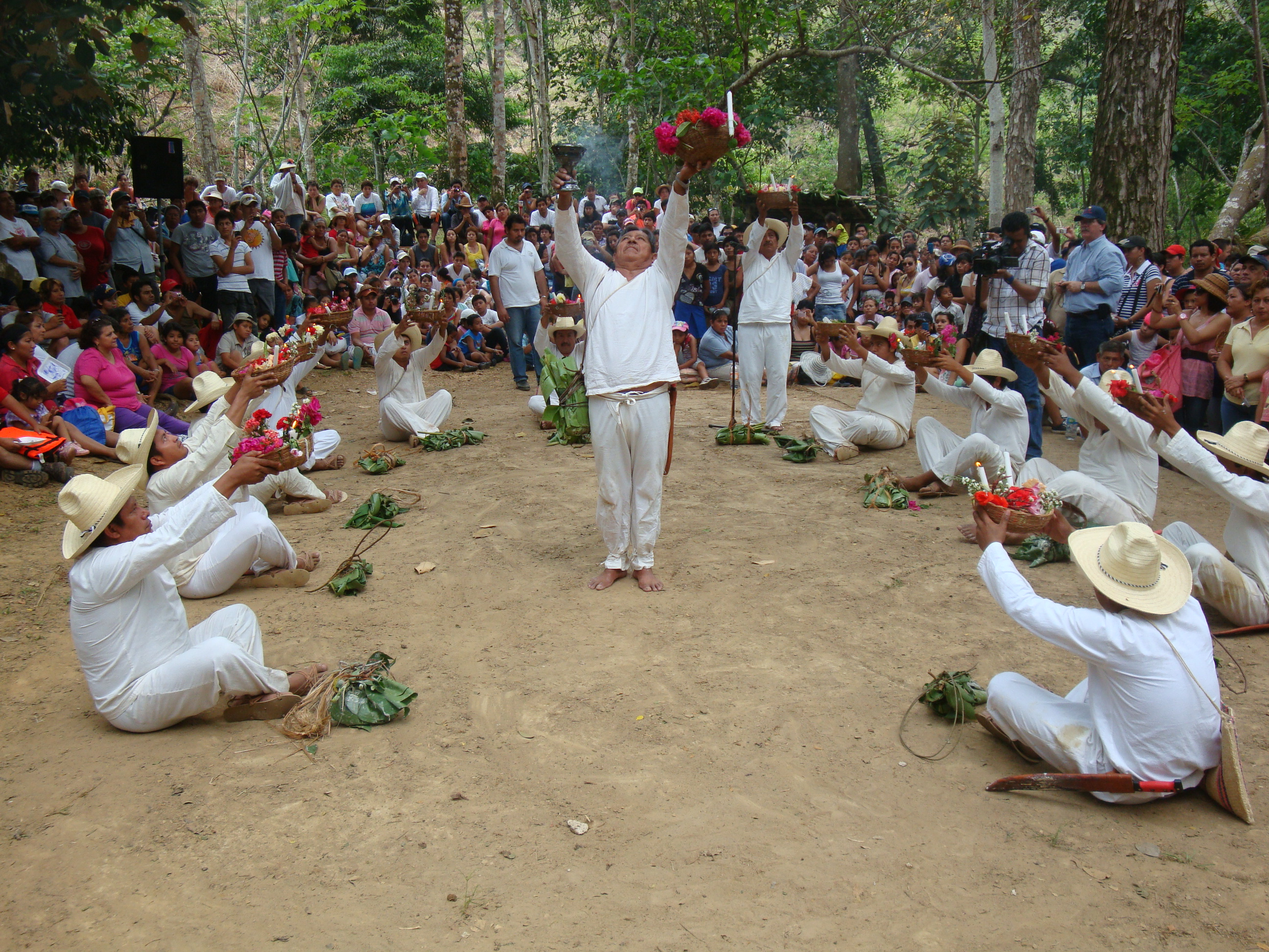 Danza de "La pesca de las sardinas", la cual se baila el domingo de ramos, en el poblado de Tapijulapa, municipio de Tacotalpa, Tabasco, México.